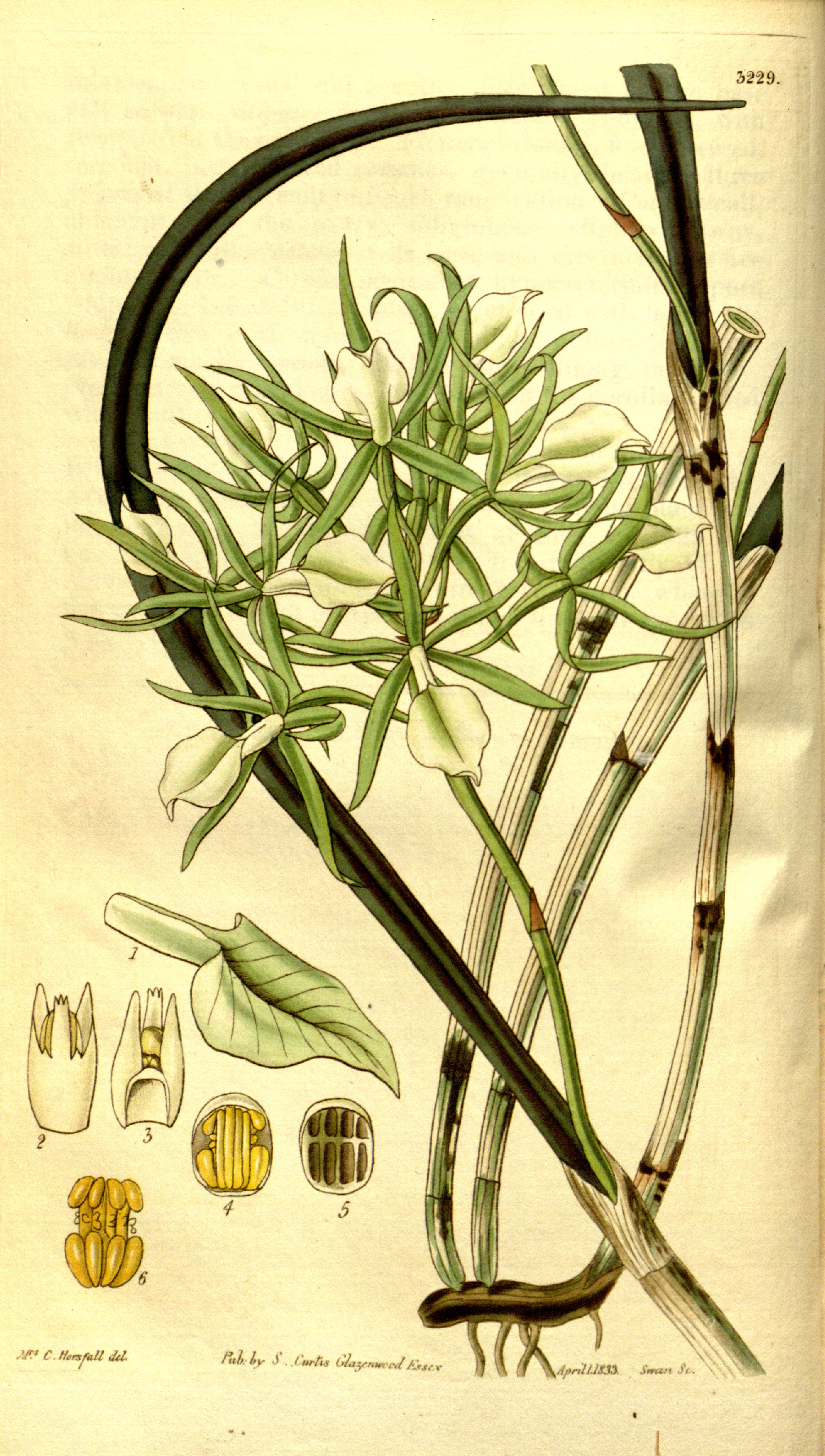 Illustration of Brassavola nodosa